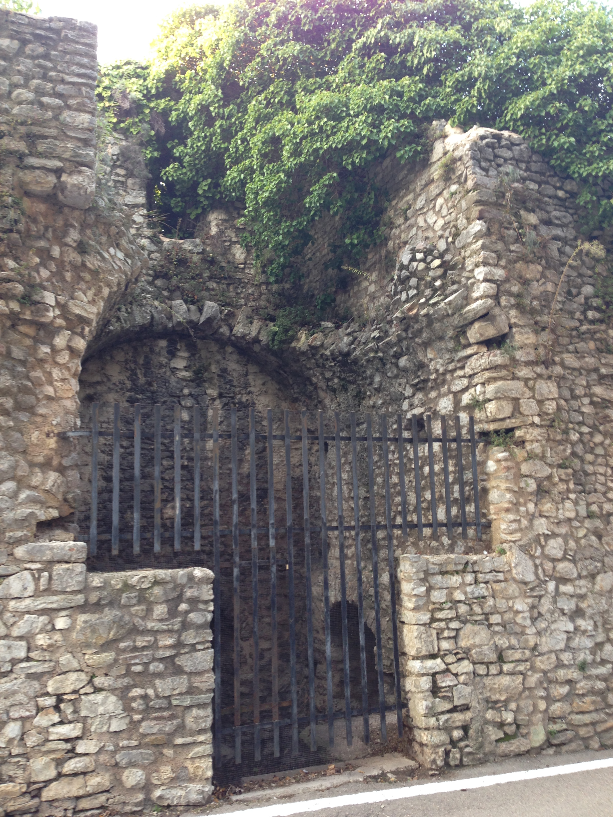 mura urbiche trecentesche Spoleto